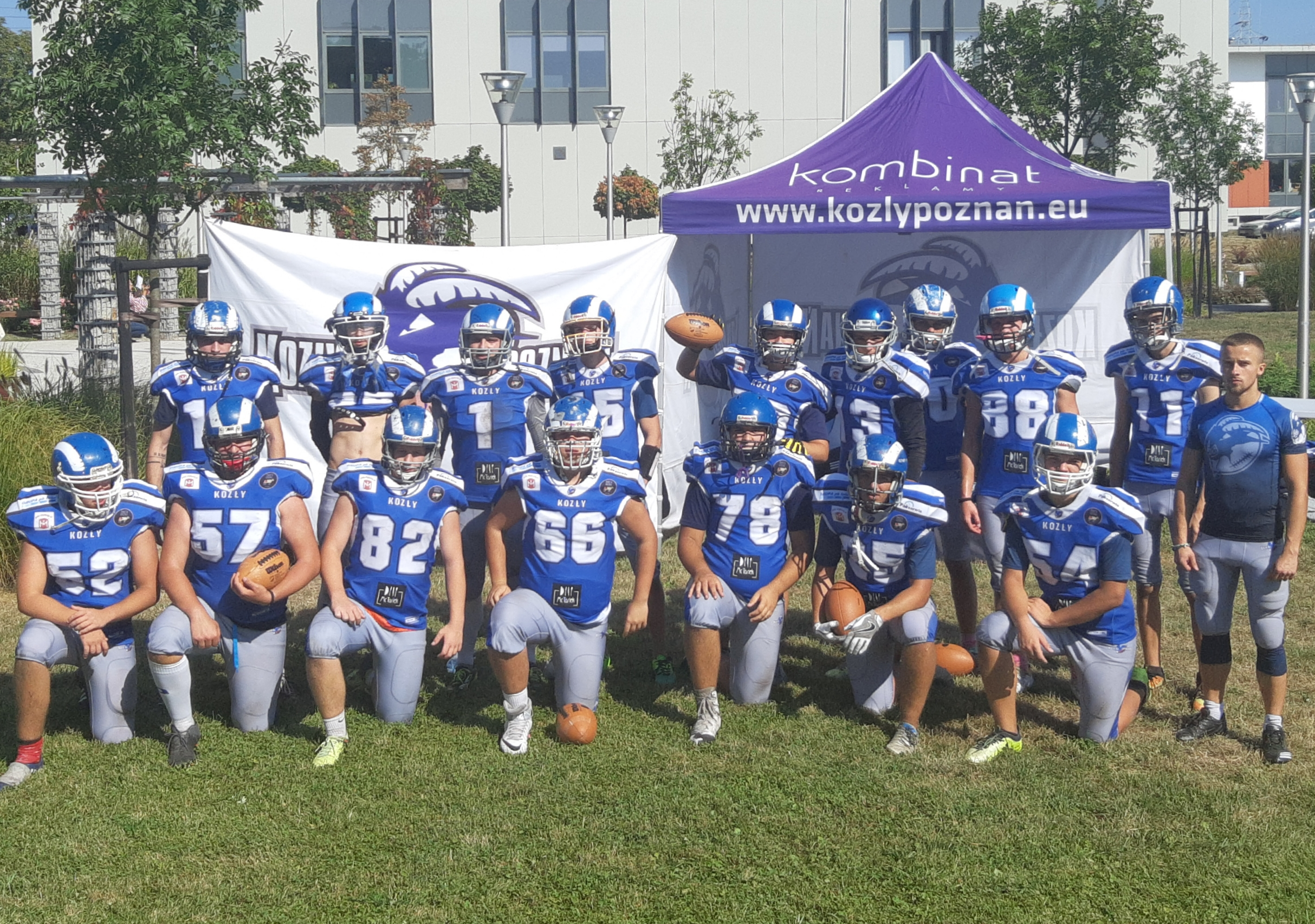 Drużyna Kozłów na Pikniku Wyobraźni w Poznaniu, Polska